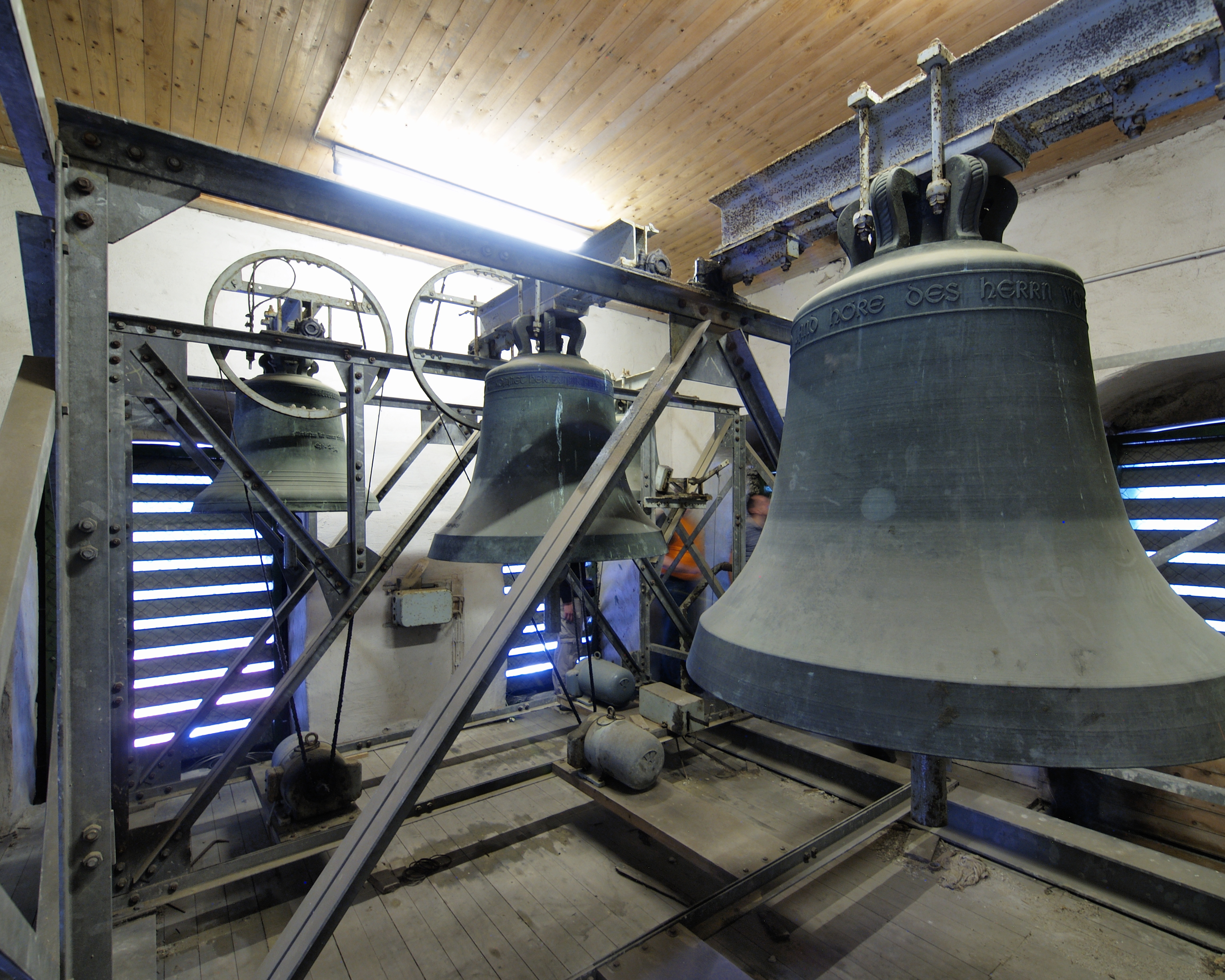 Glocken im Turm der Pauluskirche in Hückeswagen